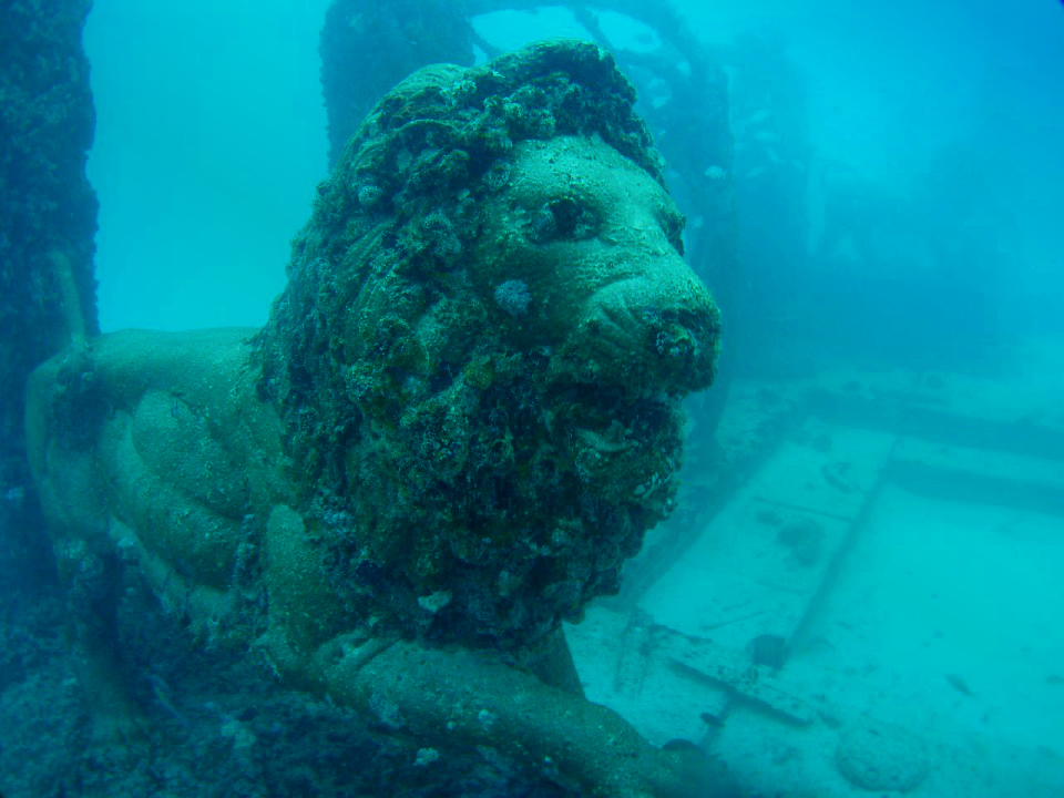 Lion statue